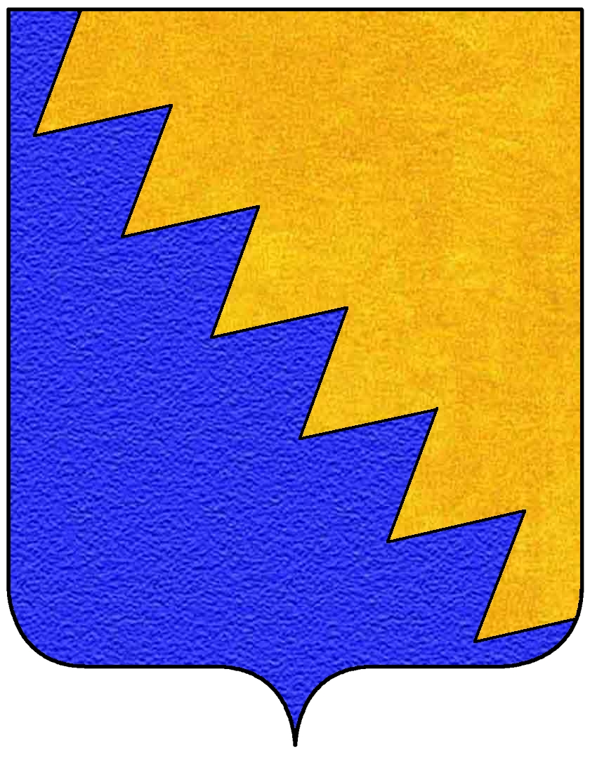 Stemma della famiglia Petrucci